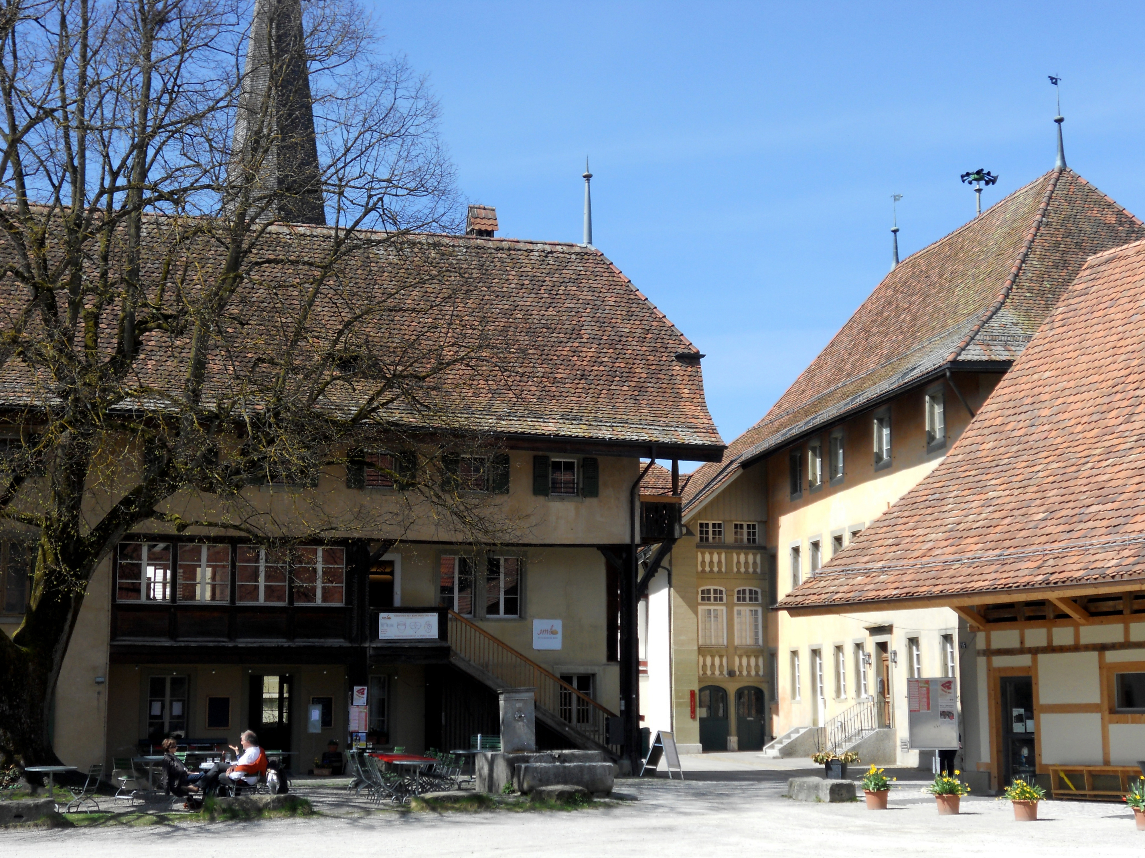 Kulturhof Schloss Köniz